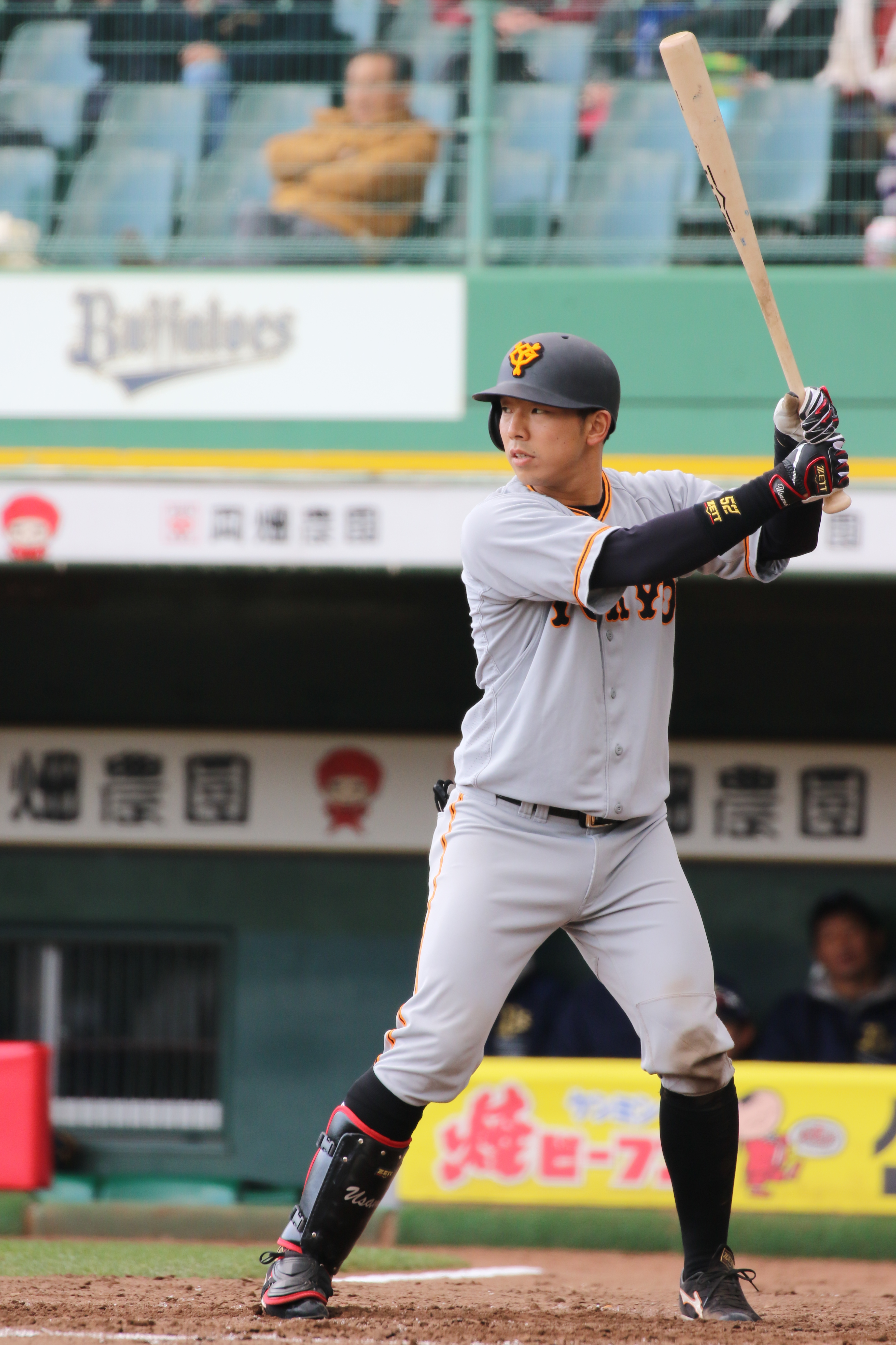 ジャイアンツ宇佐見選手